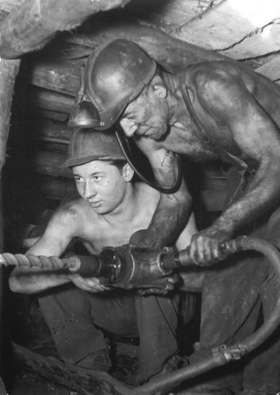 Bergarbeiter und Lehrling bohrend Zentralbild Sturm 16.1.1952 Lehrlinge unter Tage.Der praktische Unterricht der Lehrlinge des Karl Liebknecht-Schachtes im Zwickau-Ölsnitzer Steinkohlenrevier ist vor Ort unter Tage.Die Lehrausbilder, Kumpel und Steiger, bemühen sich, den Jüngsten des Schachtes ihre Erfahrungen zu vermitteln und mit den Kniffen ihrer Arbeit vertraut zu machen.UBz: In den Schächten der DDR hat sich allmähllich das Schießverfahren beim Abbau der Kohle durchgesetzt.Lehrausbilder, Steiger Renner erklärt dem Lehrling Roland Modick das Bohren der Sprenglöcher.